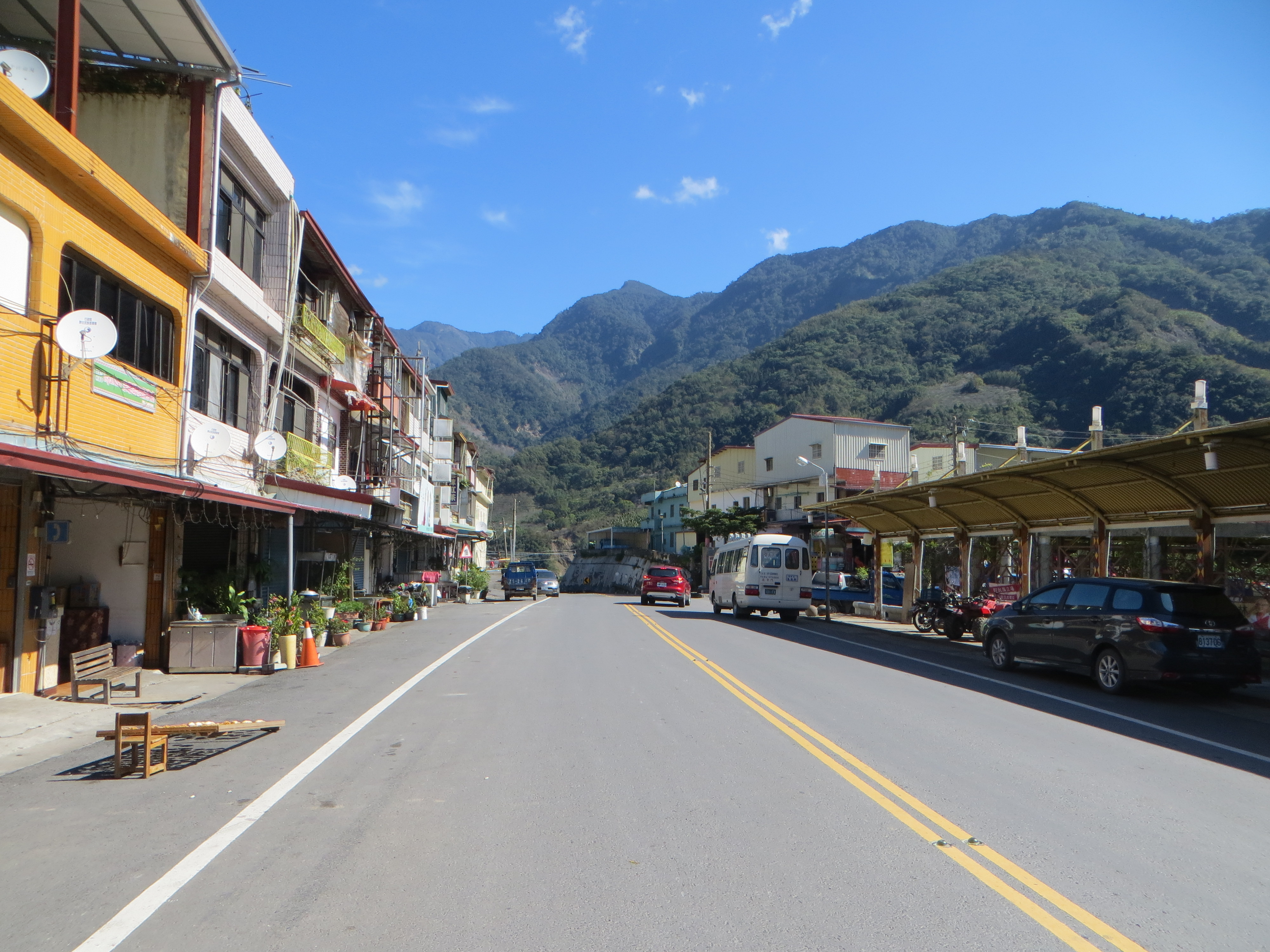 2016年1月9日，桃源區街景朝梅山口端望，右側雨棚有停一小巴，為高雄客運用車，行駛8029路線往來甲仙、桃源。